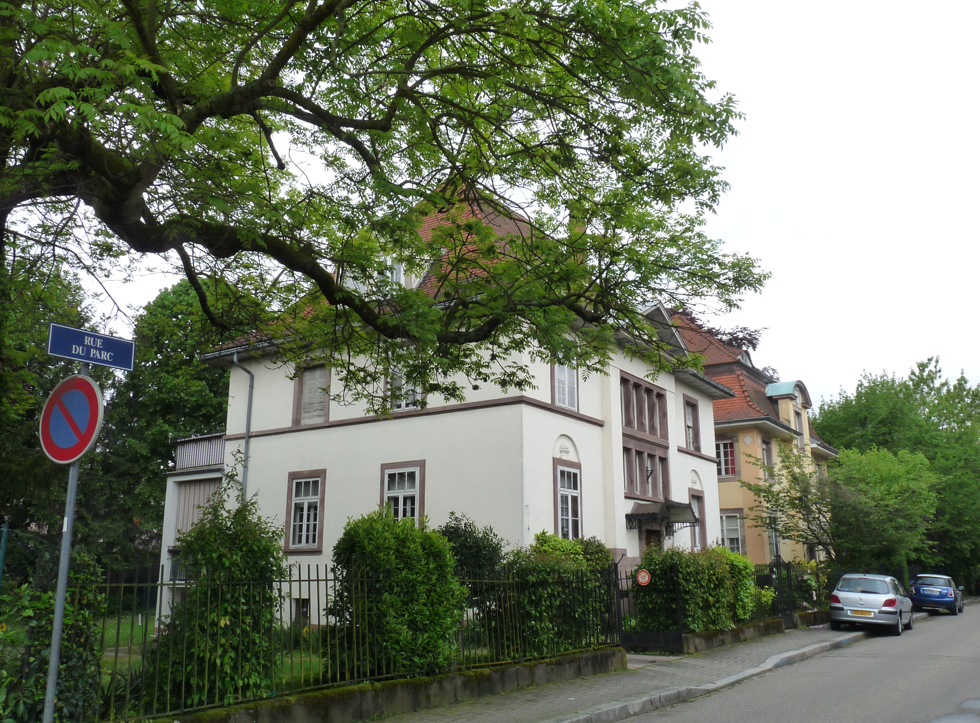 Villas, rue du Parc, quartier de la Robertsau (Strasbourg)